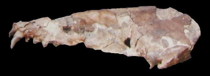 Cranio di Pliophoca etrusca rinvenuto a Orciano Pisano, conservato presso il Museo di storia naturale dell'Università di Pisa